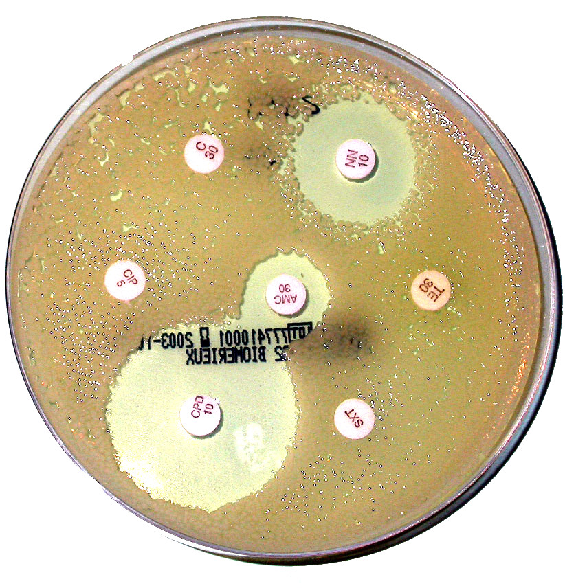 Antibiogramme d'une souche d'Escherichia coli, isolée chez un patient (image personnelle) Philippinjl 7 octobre 2005 à 14:18 (CET)